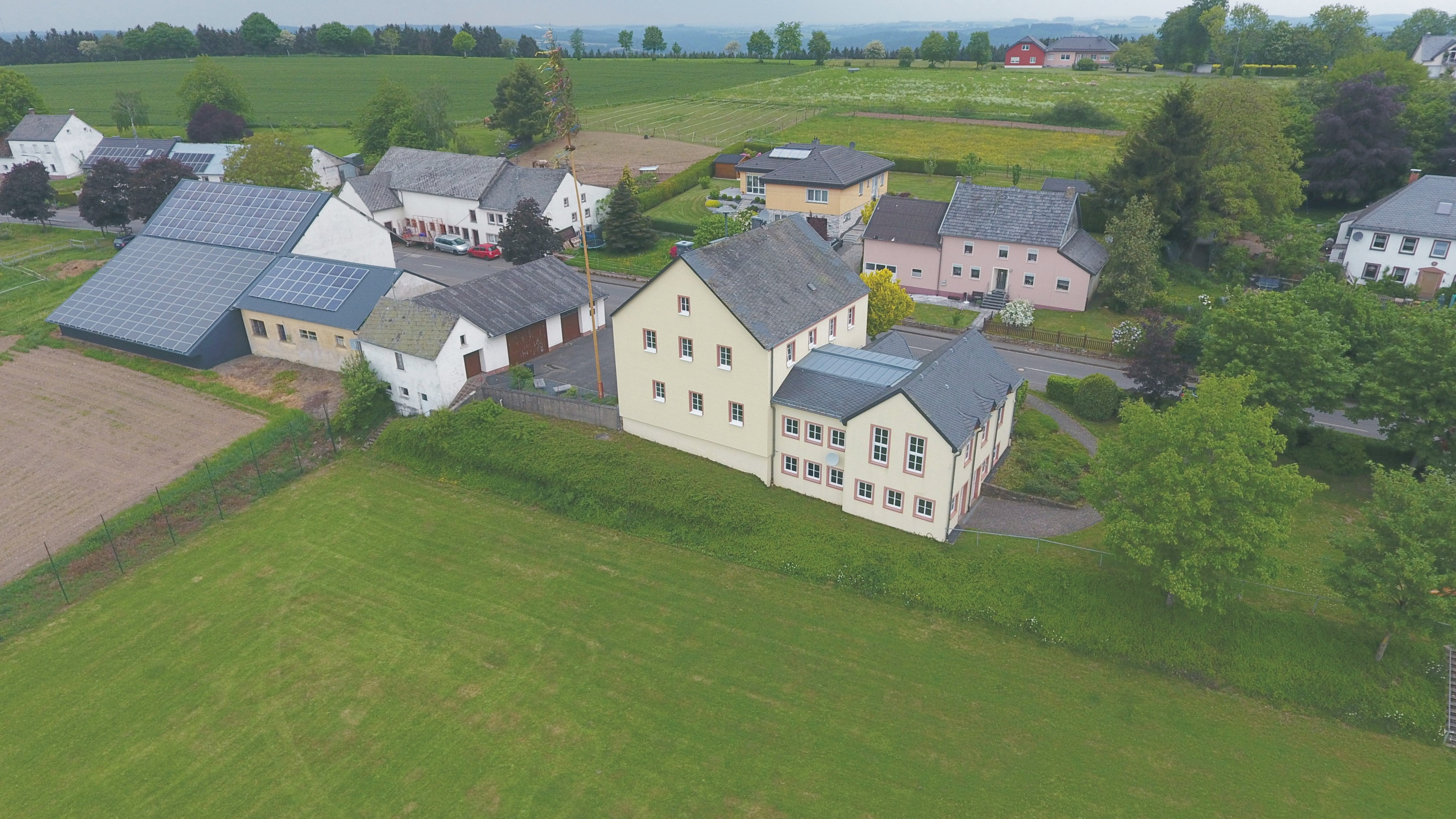 54689 Olmscheid. Die Namensendung -scheid deutet auf eine Entstehung des heutigen Ortes in der späten mittelalterlichen Rodungsphase hin. Die erste urkundliche Nennung stammt aus 1282 als Oelmerscheit. In der Feudalzeit gehörte der Ort zur Meierei Eschfeld-Arzfeld in der Herrschaft Dasburg, Quartier Vianden. Aufnahme des Gemeindehauses von 2018.